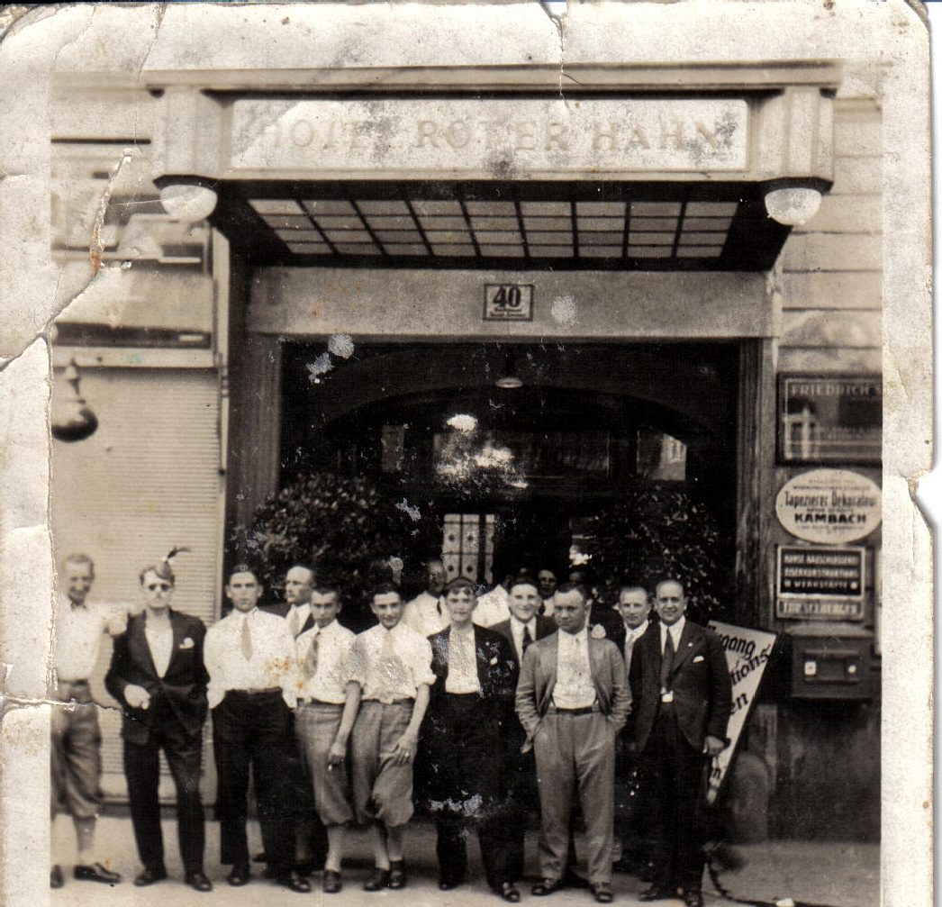 Zygmunt Rajdek i zawodnicy Legii pod hotelem Roter Hahn Venna